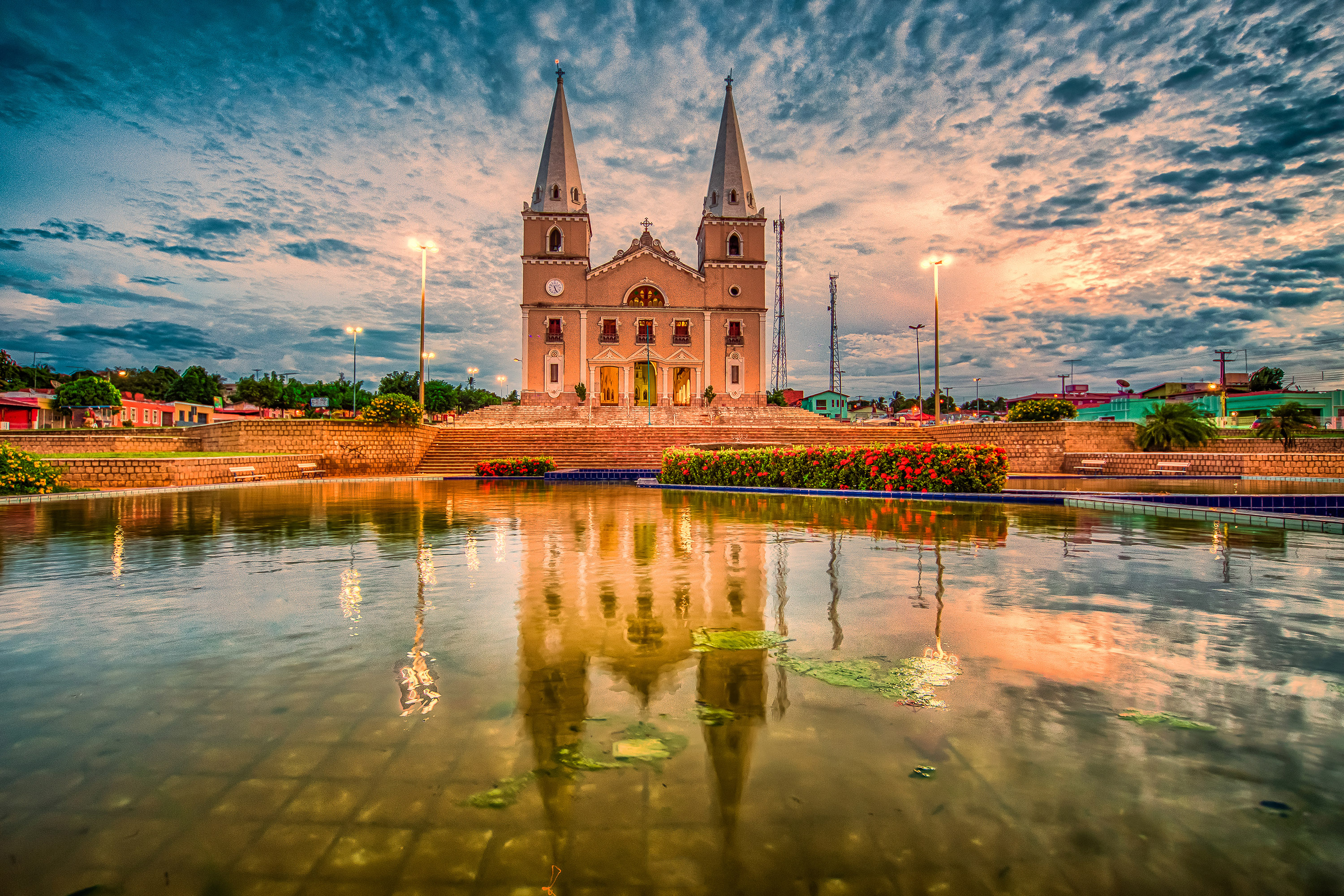 Igreja Matriz de Ceará Mirim